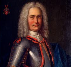 Jean-Henri, baron d'Anthès 1670-1733